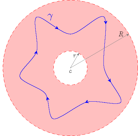 Serie de Laurent: Dominio anular donde se puede incluir a la curva de integración de los coeficientes.